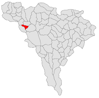 Categorie:Hărţi ale judeţului Alba